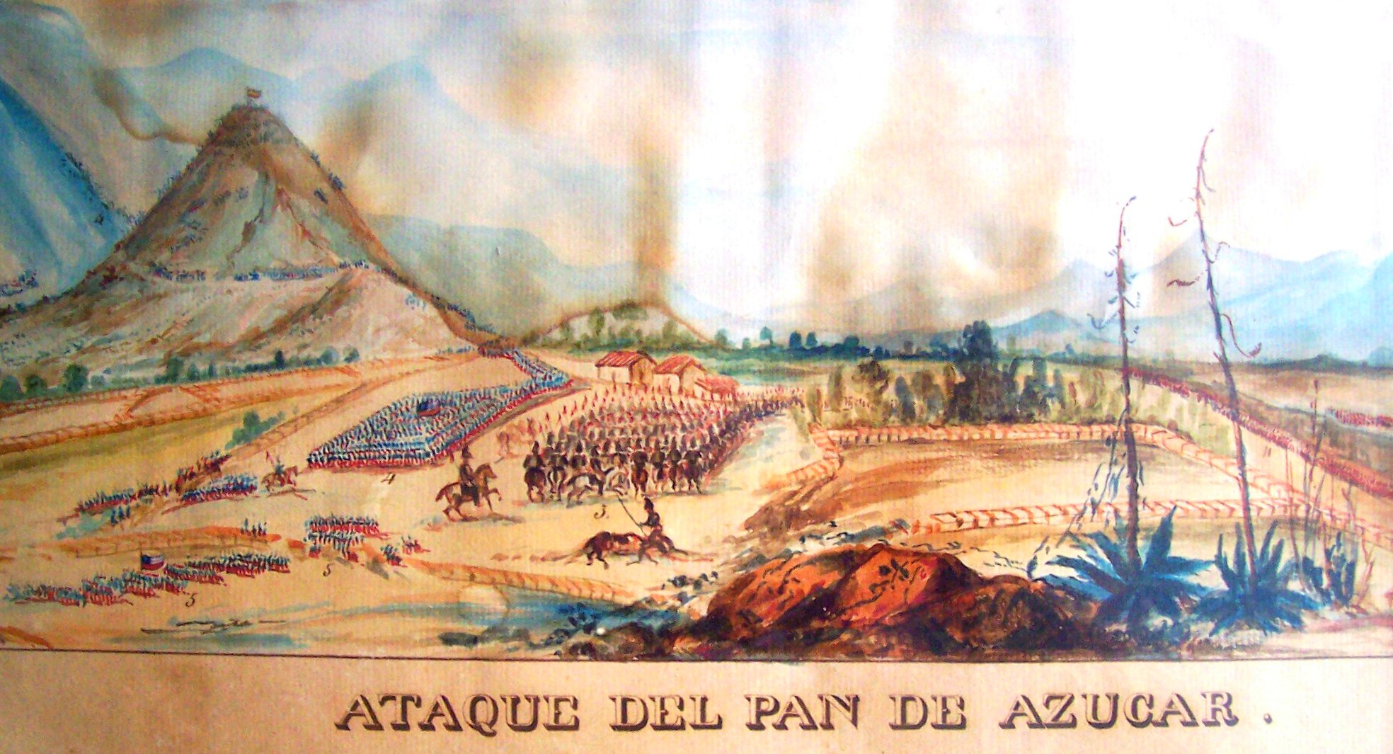 Detalle de la acuarela de Wood. La toma del cerro Pan de Azúcar fue un episodio de la Batalla de Yungay librada el 20 de enero de 1839 en el marco de la guerra entre la Confederación Perú-Boliviana y Chile.